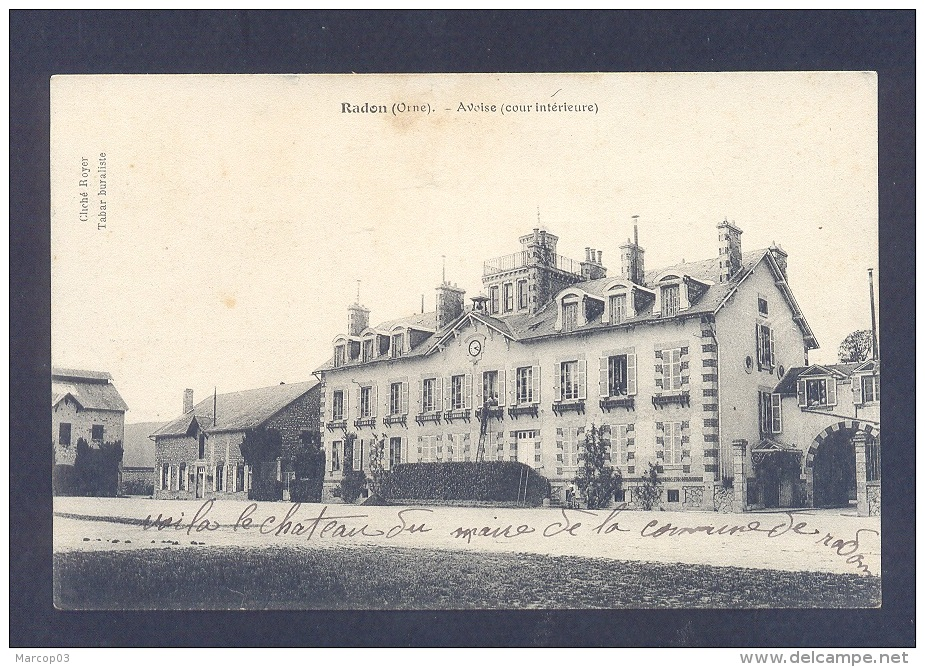 Chateau d'Avoise